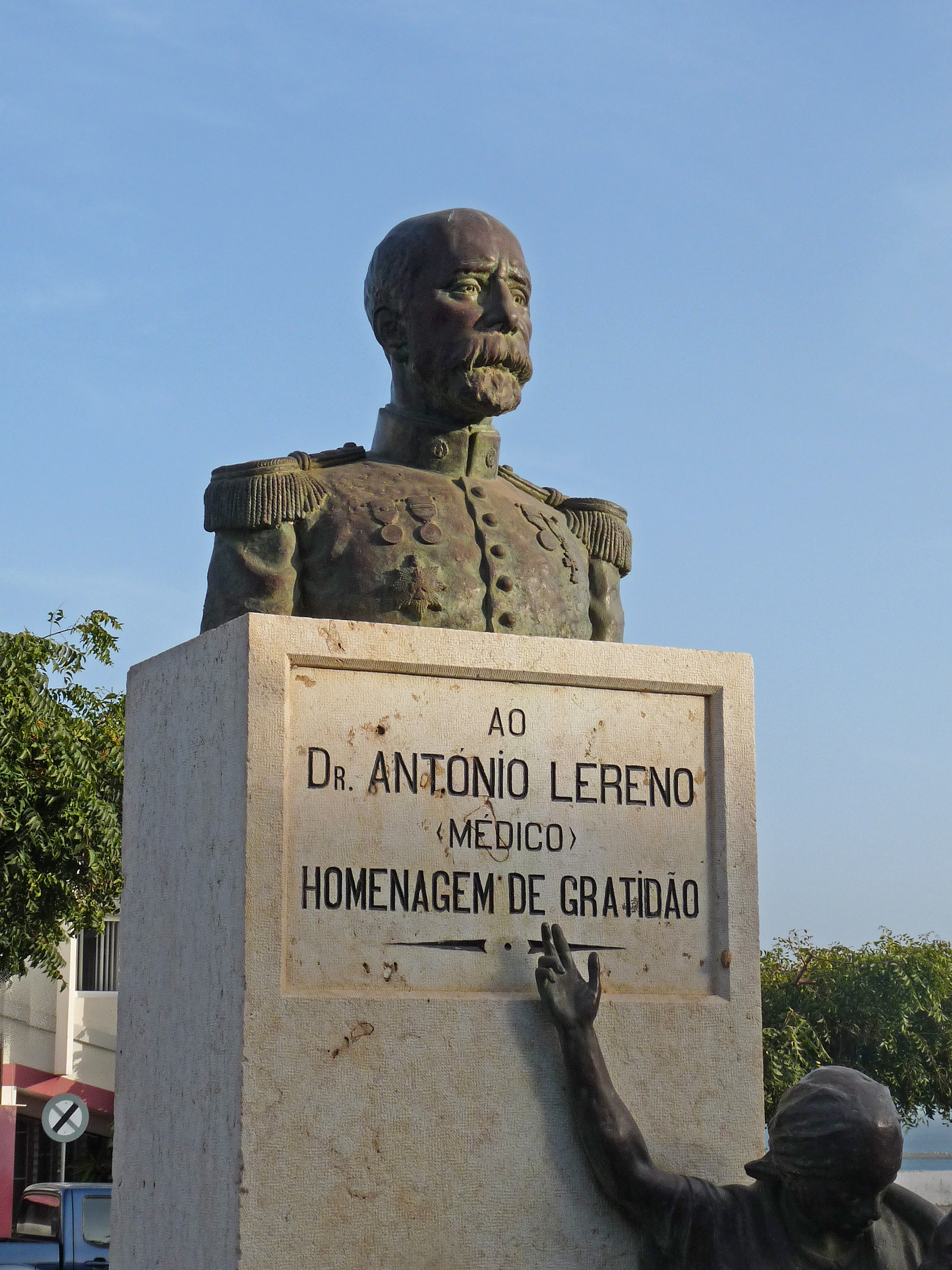 Praia (Cap-Vert) : monument à la mémoire du Dr. António Lereno